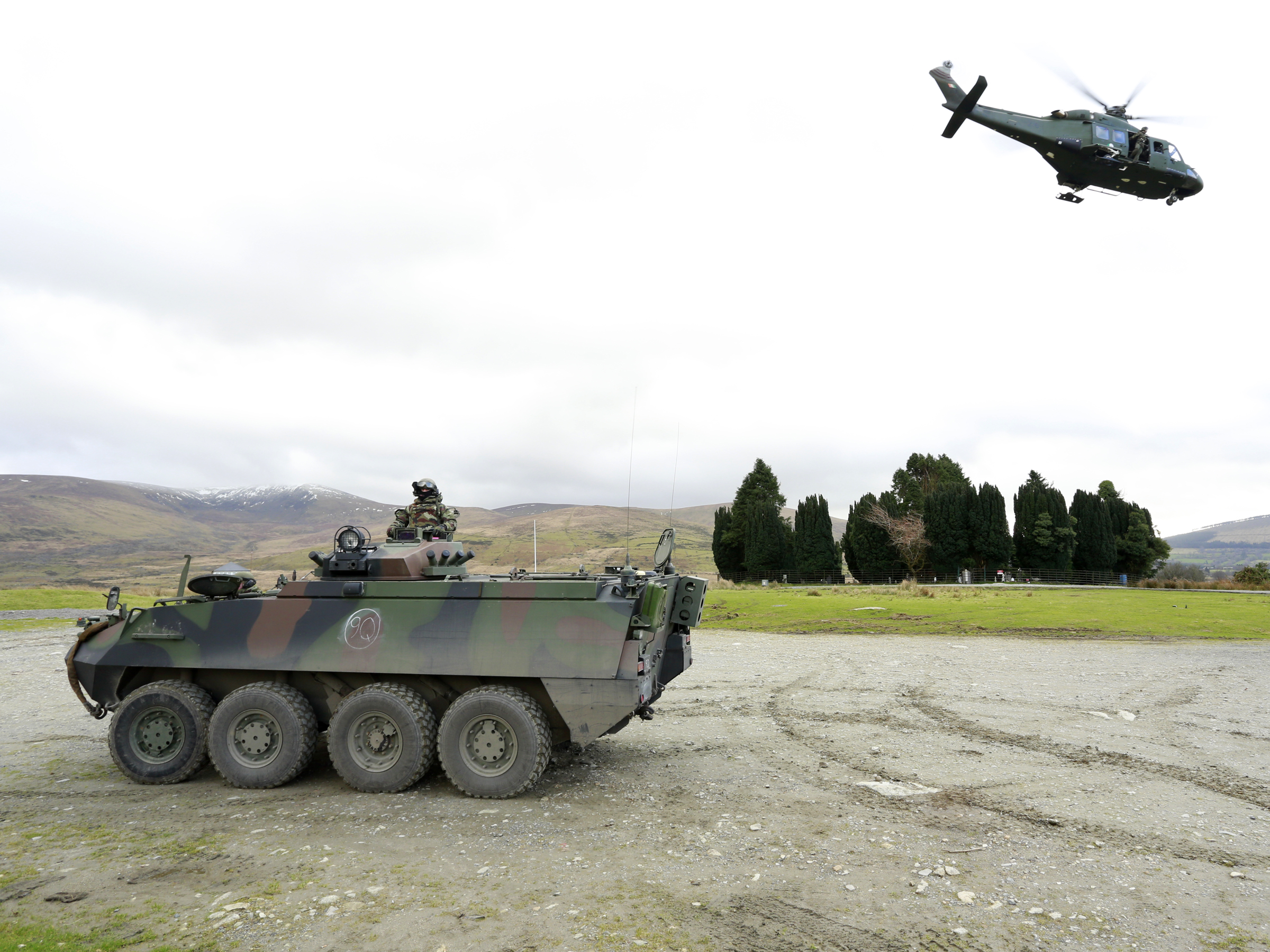 MRE 14